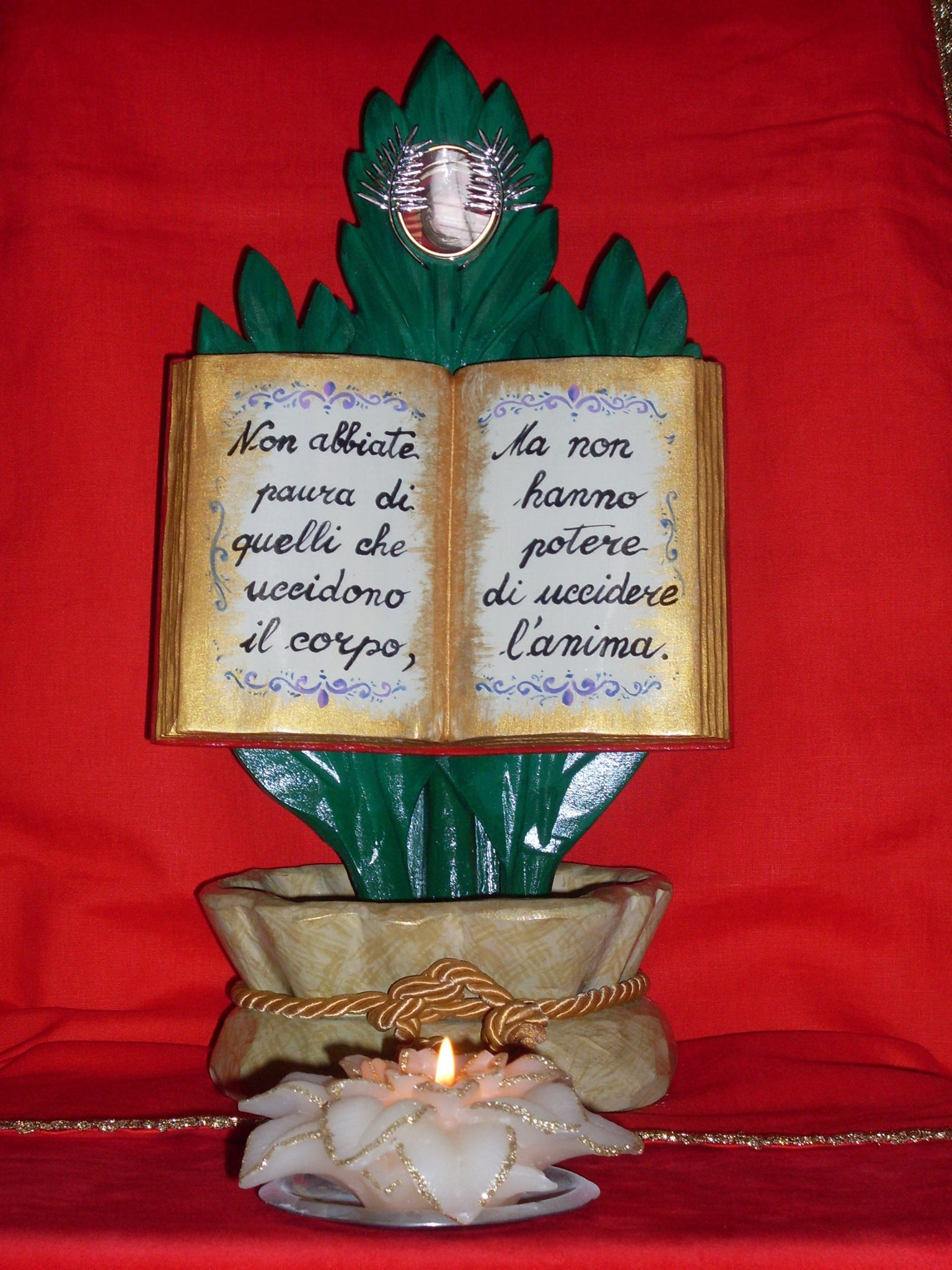 Reliquiario di San Cesareo diacono e martire, Parrocchia San Cesario in San Cesareo di Cava de' Tirreni (Sa).